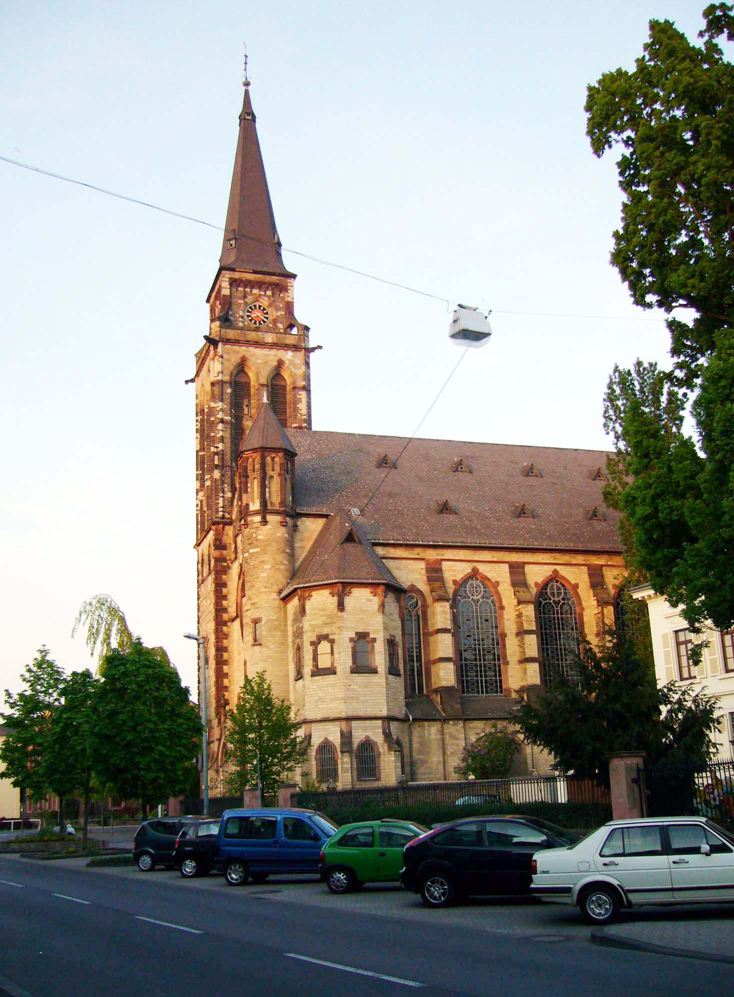 römisch-katholische Kirche St. Matthias an der Heddesdorfer Straße in Neuwied, Rheinland-Pfalz; erbaut 1898-1901 nach Entwurf von Heinrich Krings; unter Denkmalschutz